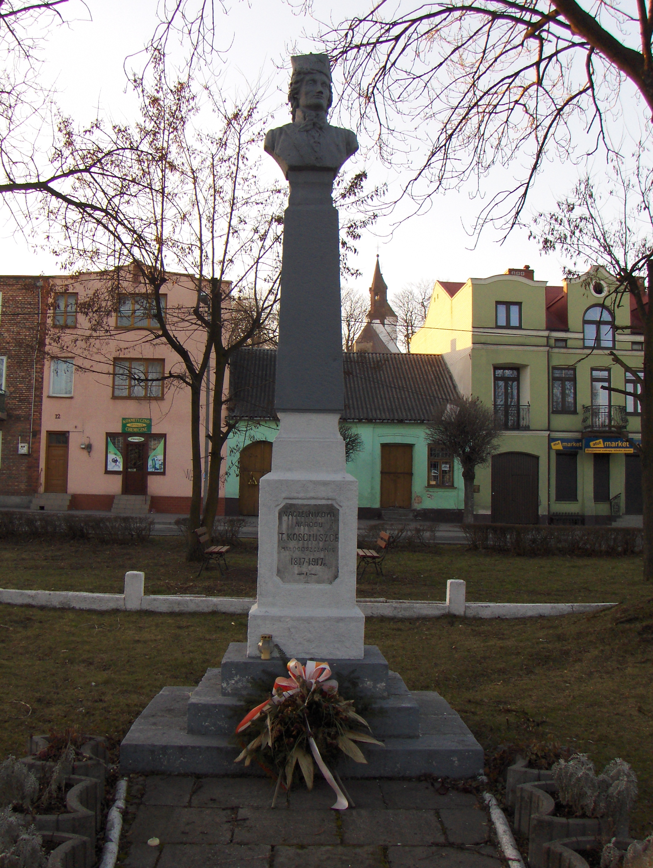 Popiersie Tadeusza Kościuszki na rynku w Małogoszczu